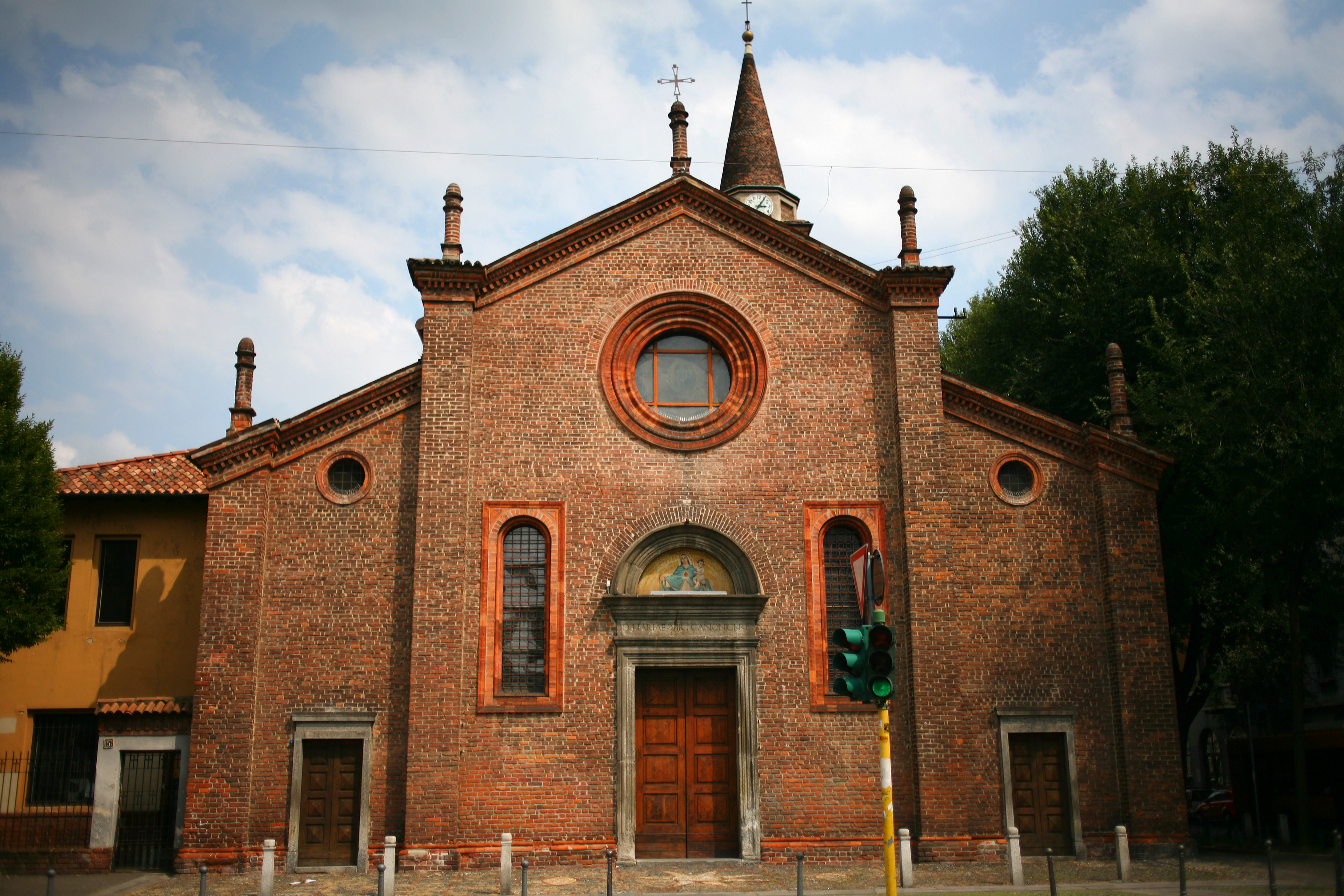 Vista della facciata dell'Abbazia di Casoretto, Milano